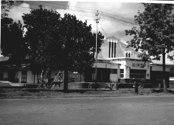 Foto. Zijaanzicht van het kantoor van de NIMEF-fabriek, Bandung